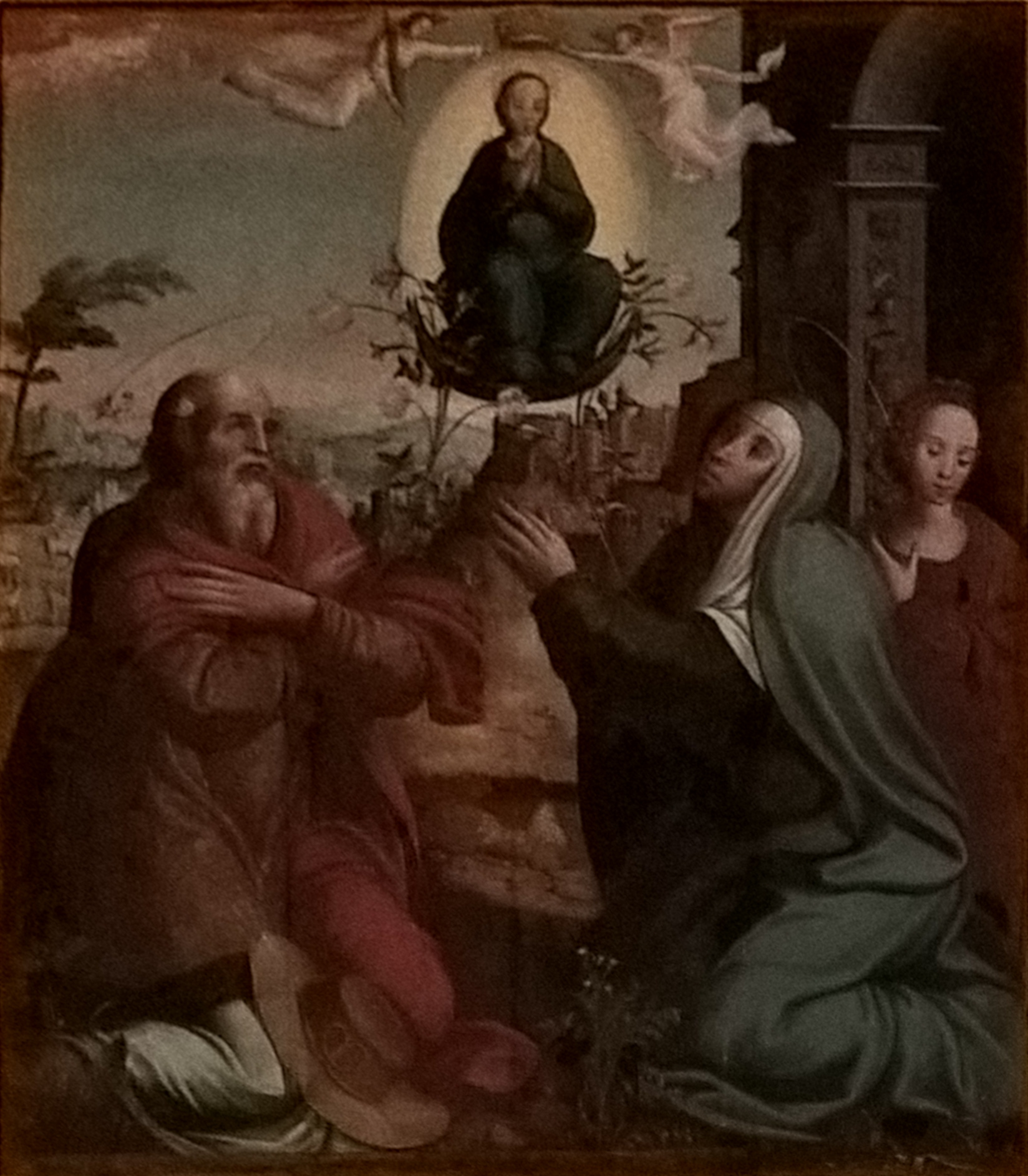 Pintura a óleo sobre tela "Encontro de Santa Ana e São Joaquim" do Mestre de Arruda dos Vinhos, integrante do Políptico quinhentista da Matriz de Arruda dos Vinhos, de cerca de 1550